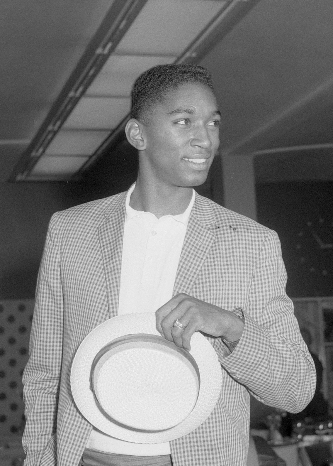 Aankomst Amerikaanse Olympische atleten op Schiphol, John Thomas poseert voor de fotografen